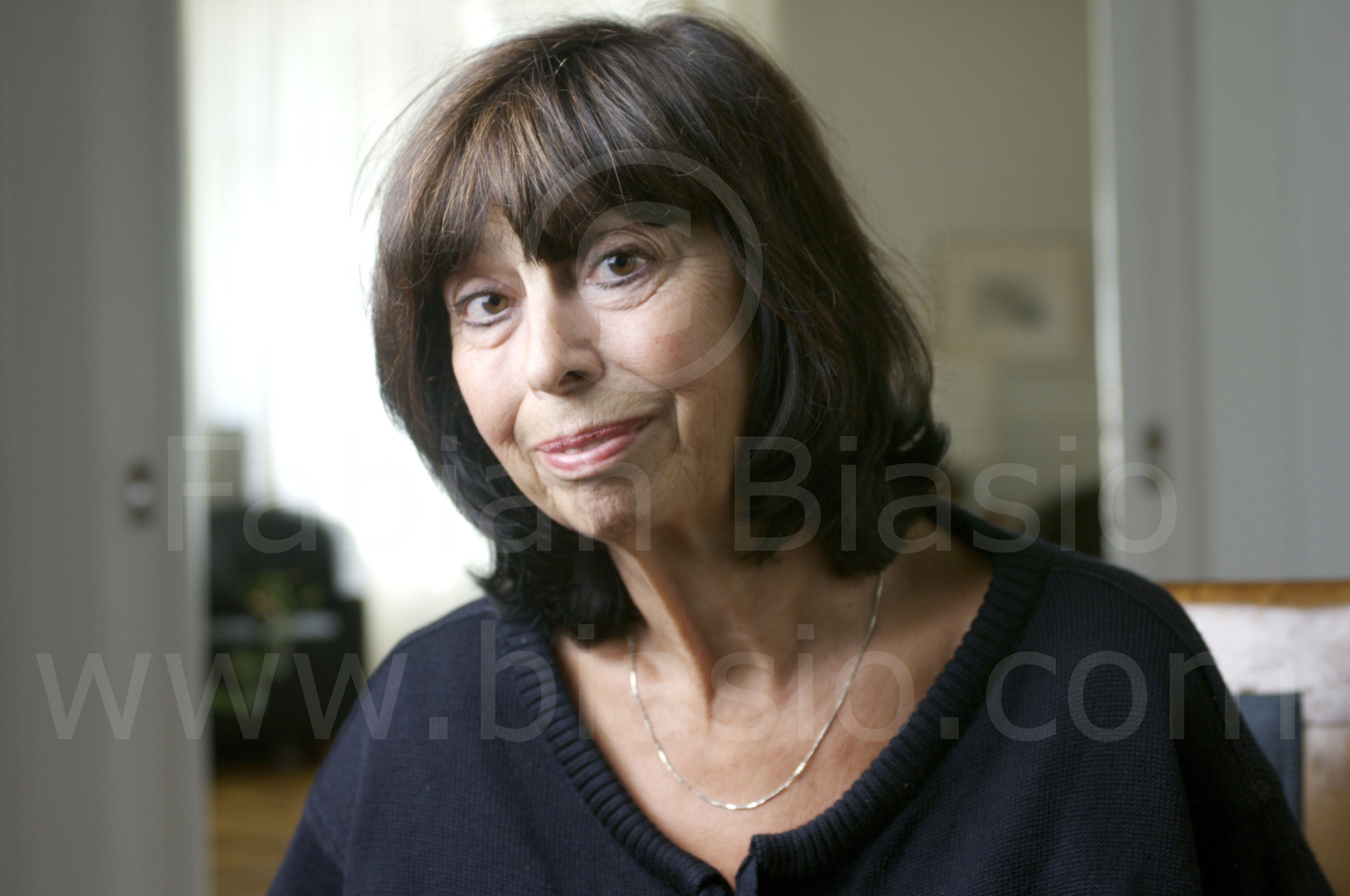 Margrit Sprecher, Zürich